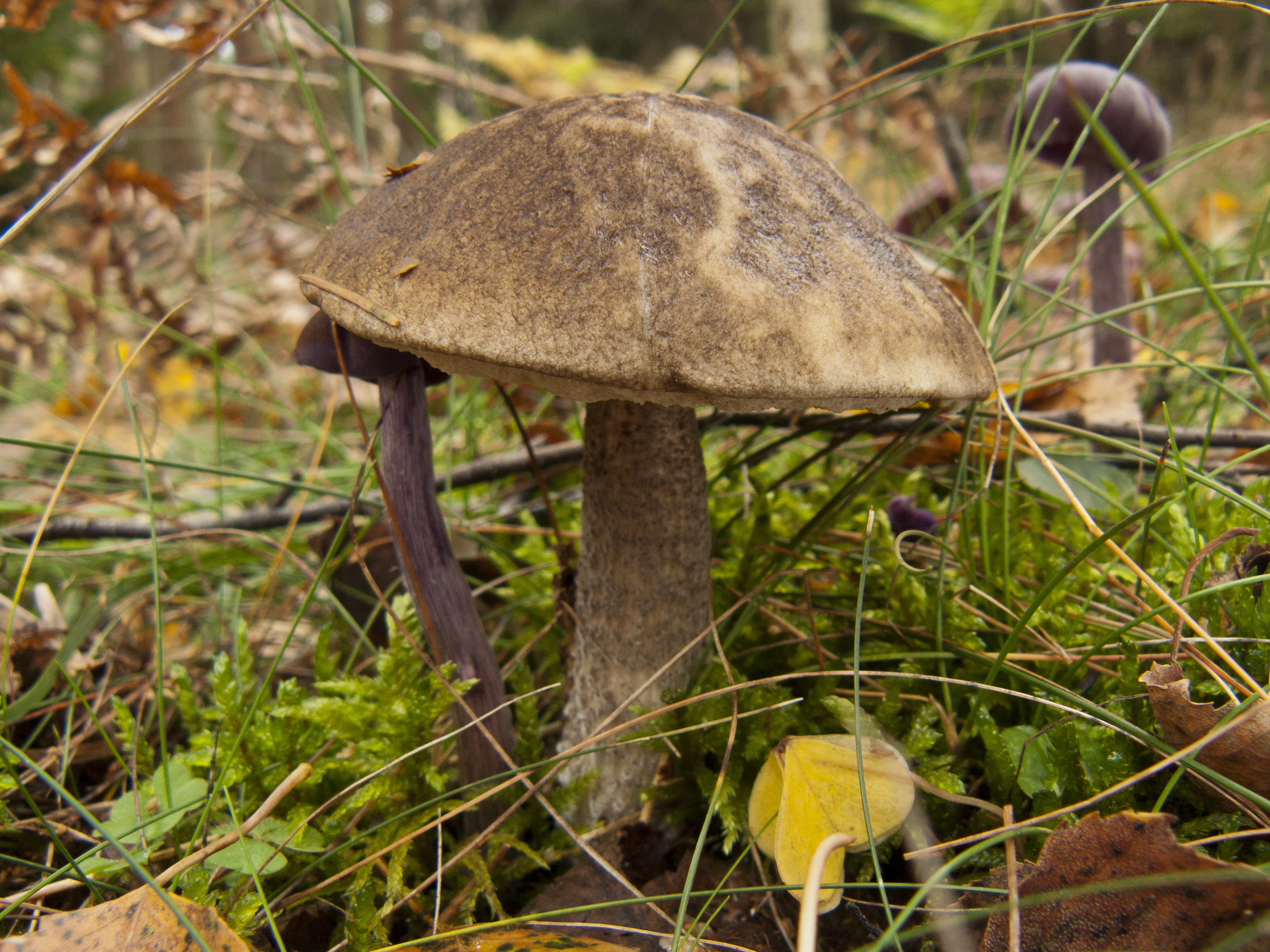 Kozák březový (Leccinum scabrum). Přírodní park Jabkenicko.